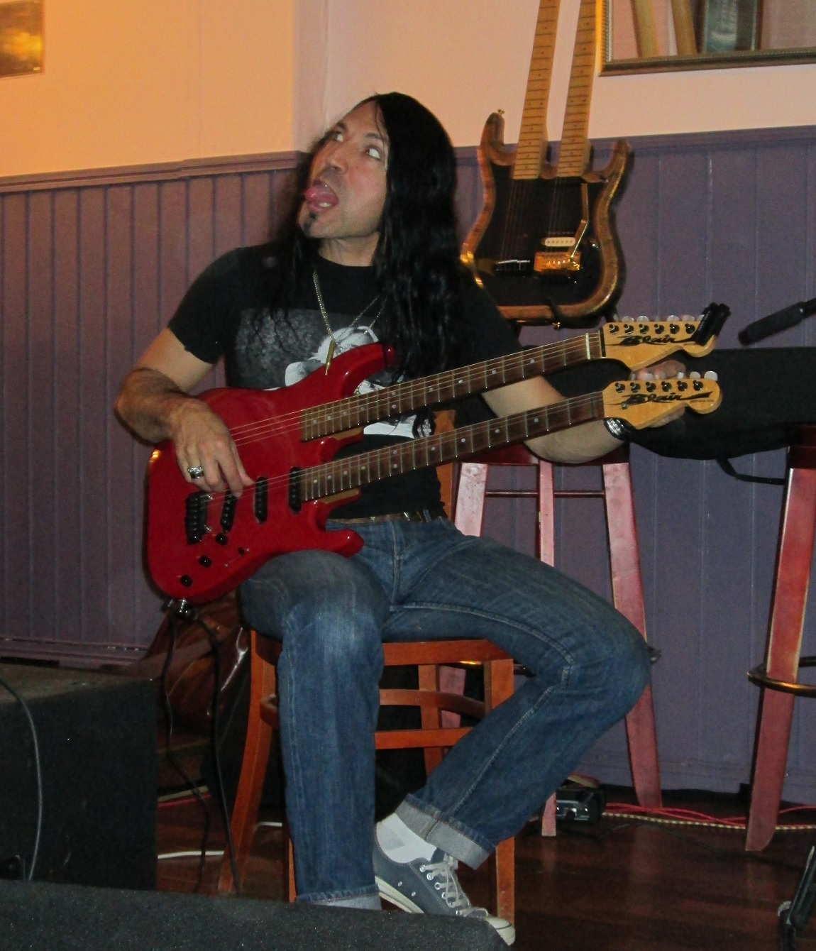 Doug Blair Naantalissa 5.12.2013